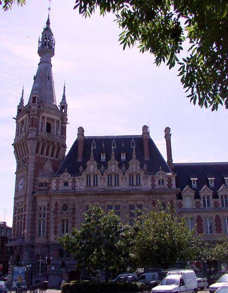 Beffroi de l'ancienne Chambre et Bourse de Commerce de Tourcoing.